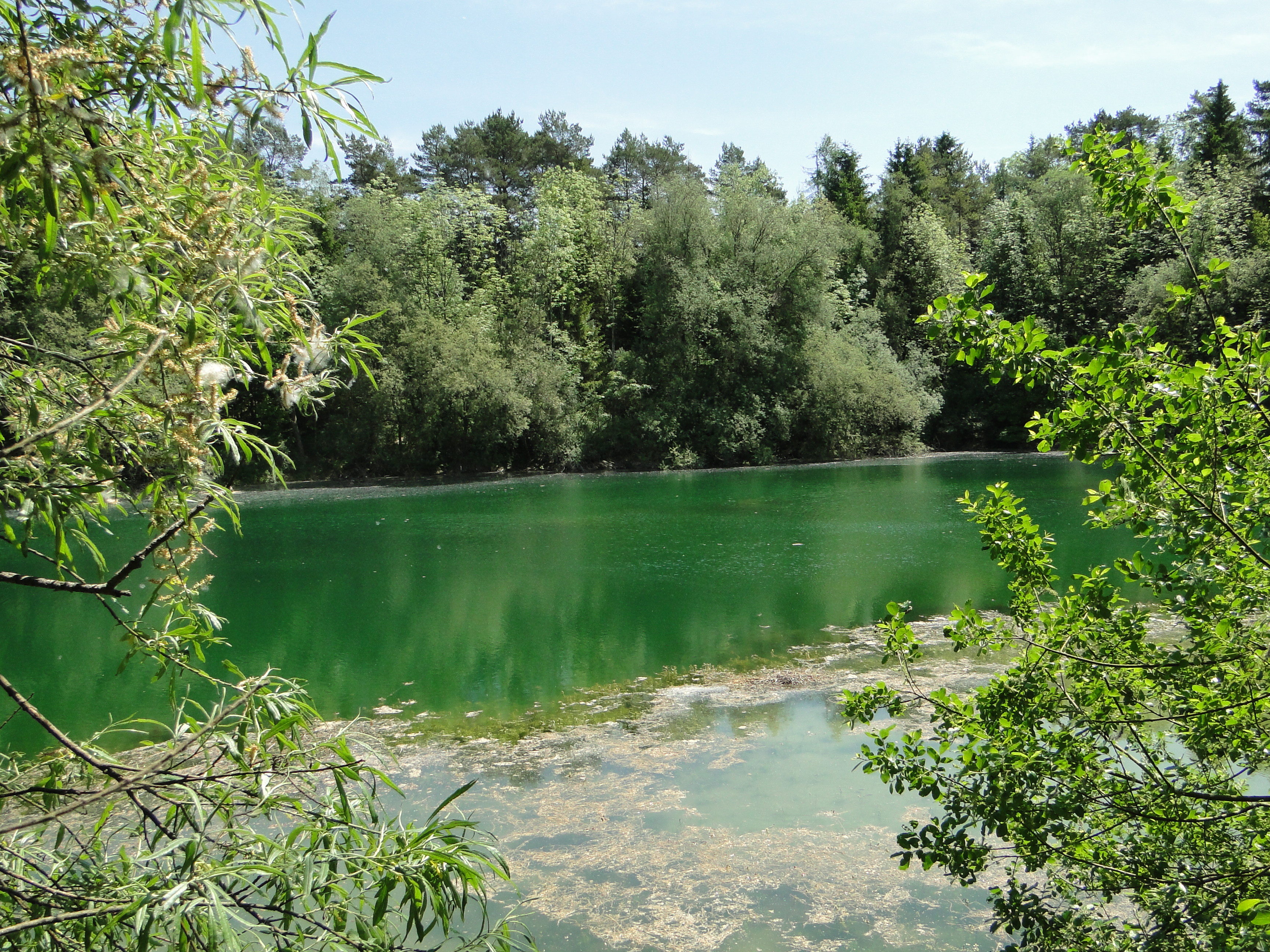 Südlicher Baggersee, Naturschutzgebiet Kiesgrube Aitrach